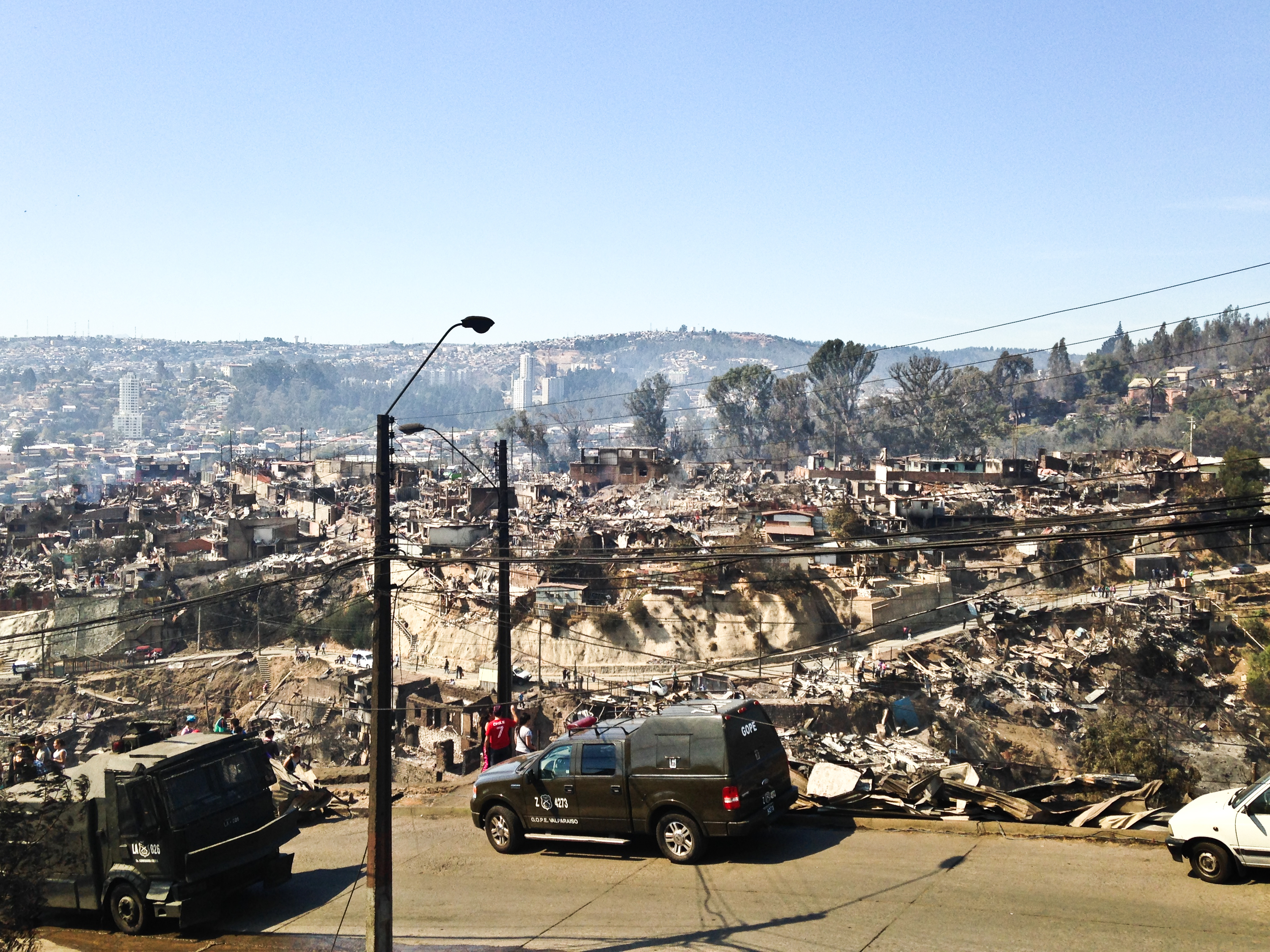 Un cerro incendiado por el paso del gran incendio de Valparaíso de 2014.